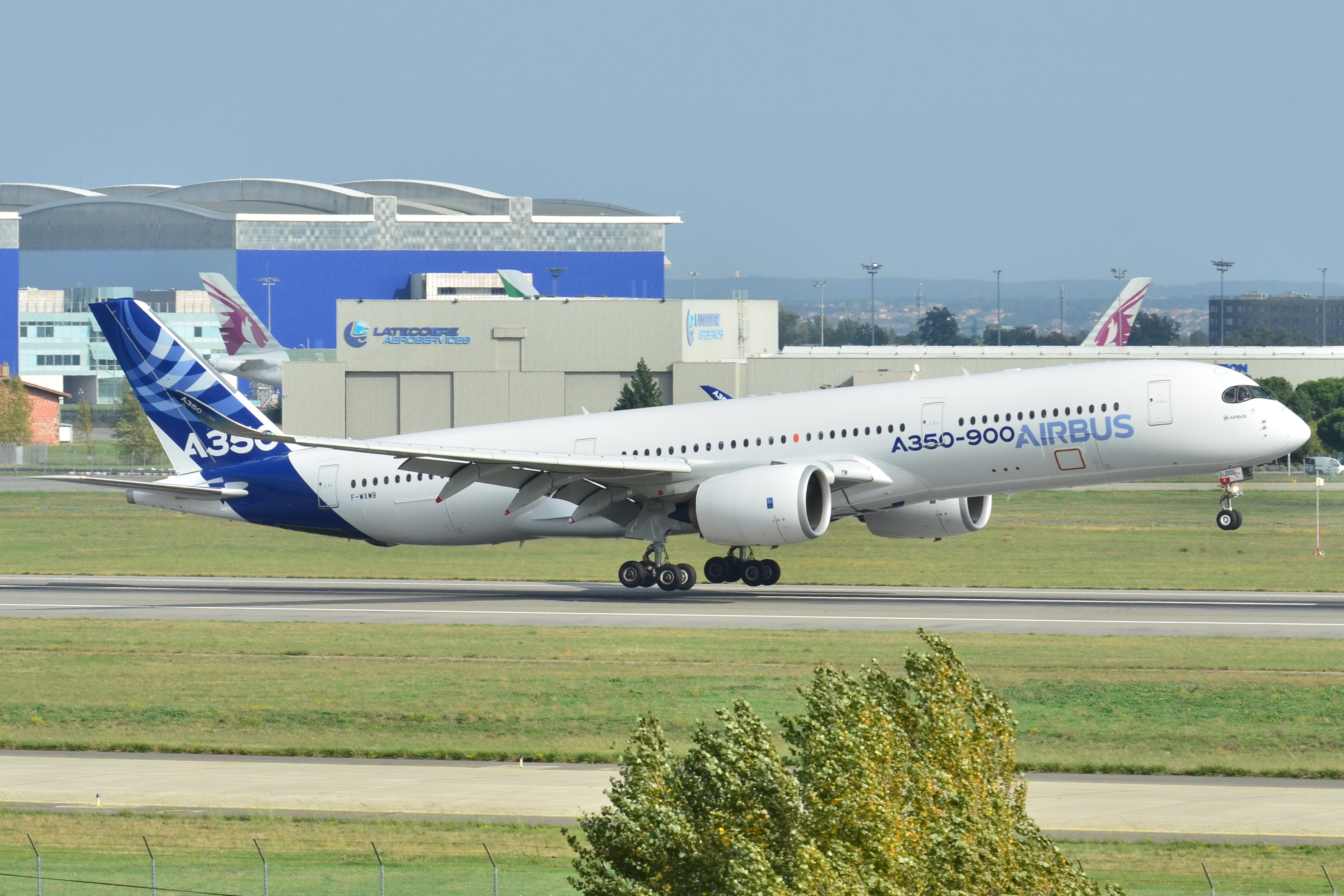 Photo prise à l'aéroport de Toulouse-Blagnac (LFBO) en France. Picture take at Toulouse-Blagnac Airport (LFBO) in France.